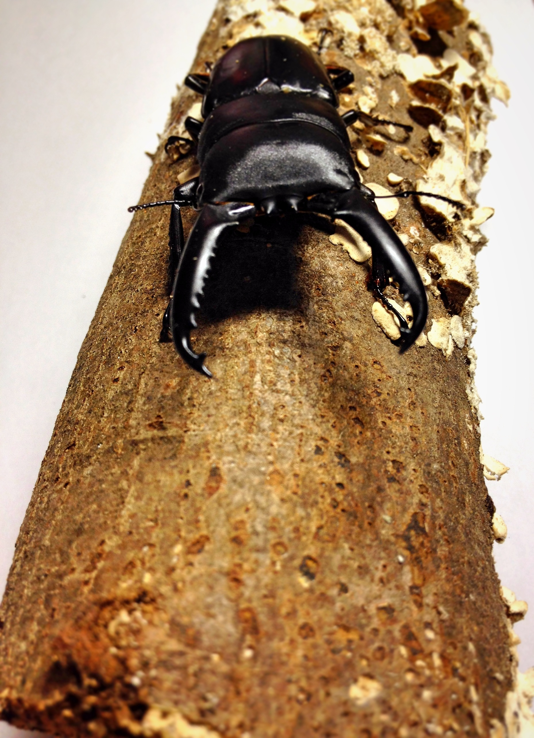 ツシマヒラタクワガタ